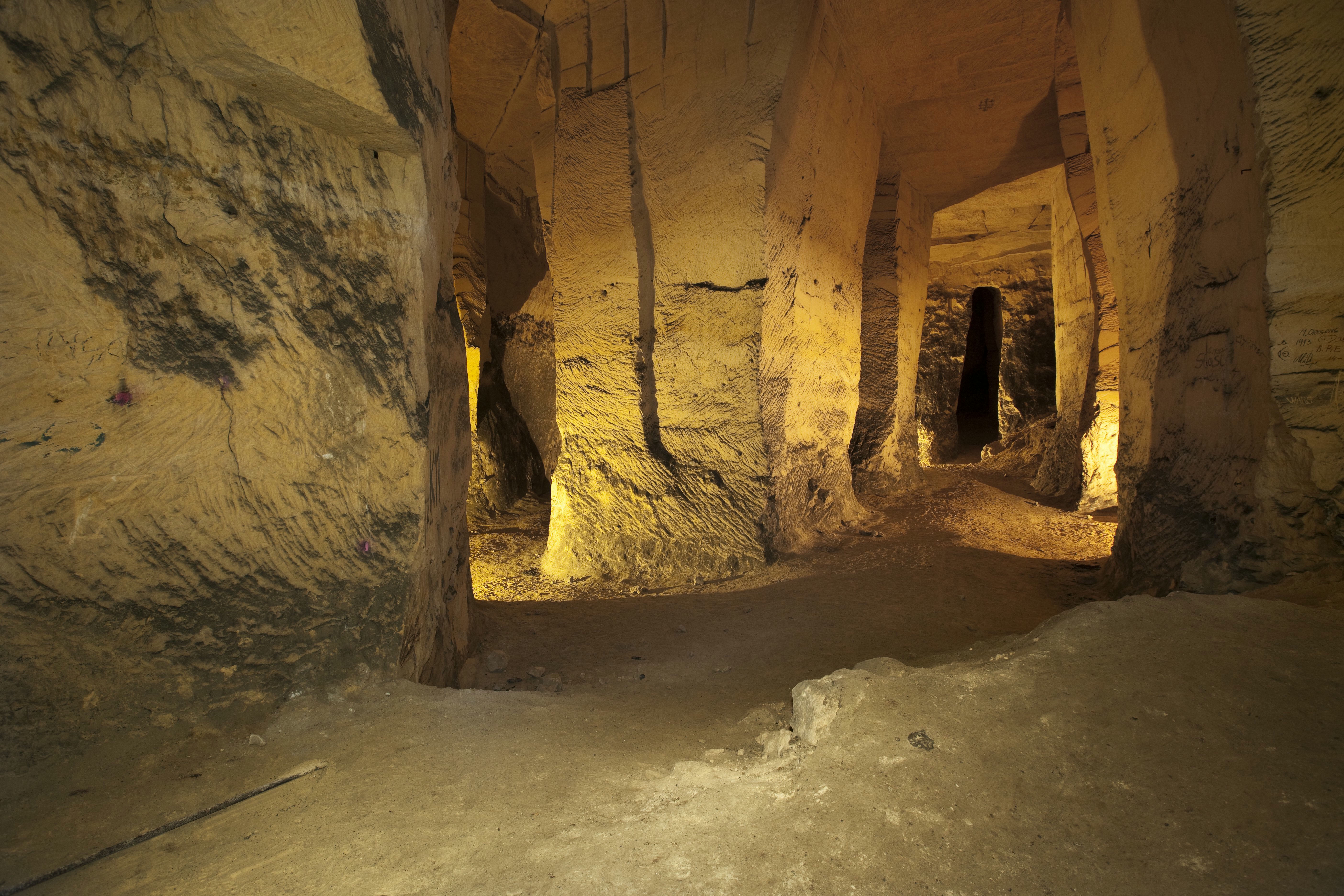 Mergelgrot/ Wandversiering: Overzicht tunnel in mergelgrot